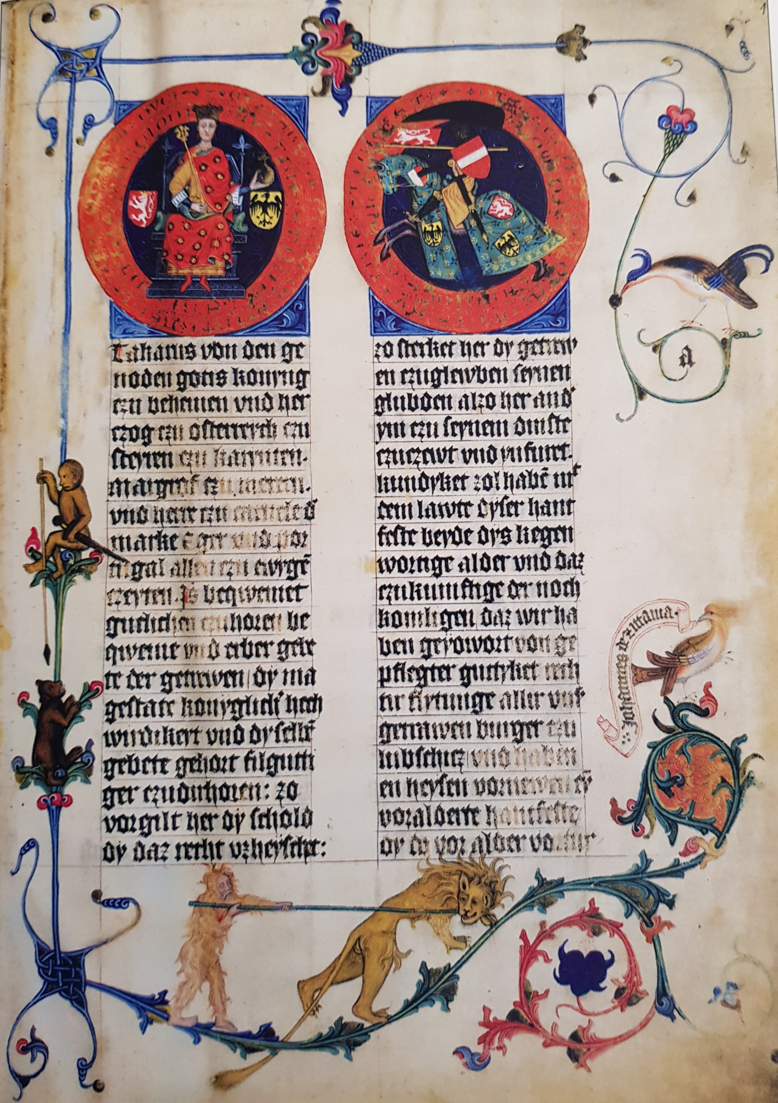 Strona z rękopisu Prawo miejskie dla Głubczyc z 1421, iluminacja autorstwa Jana z Żytawy